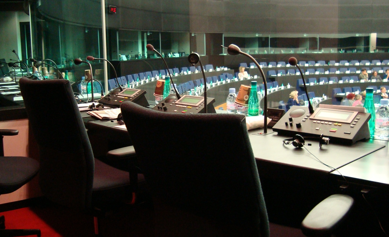 Cabine d'interprétation, Parlement européen, Strasbourg